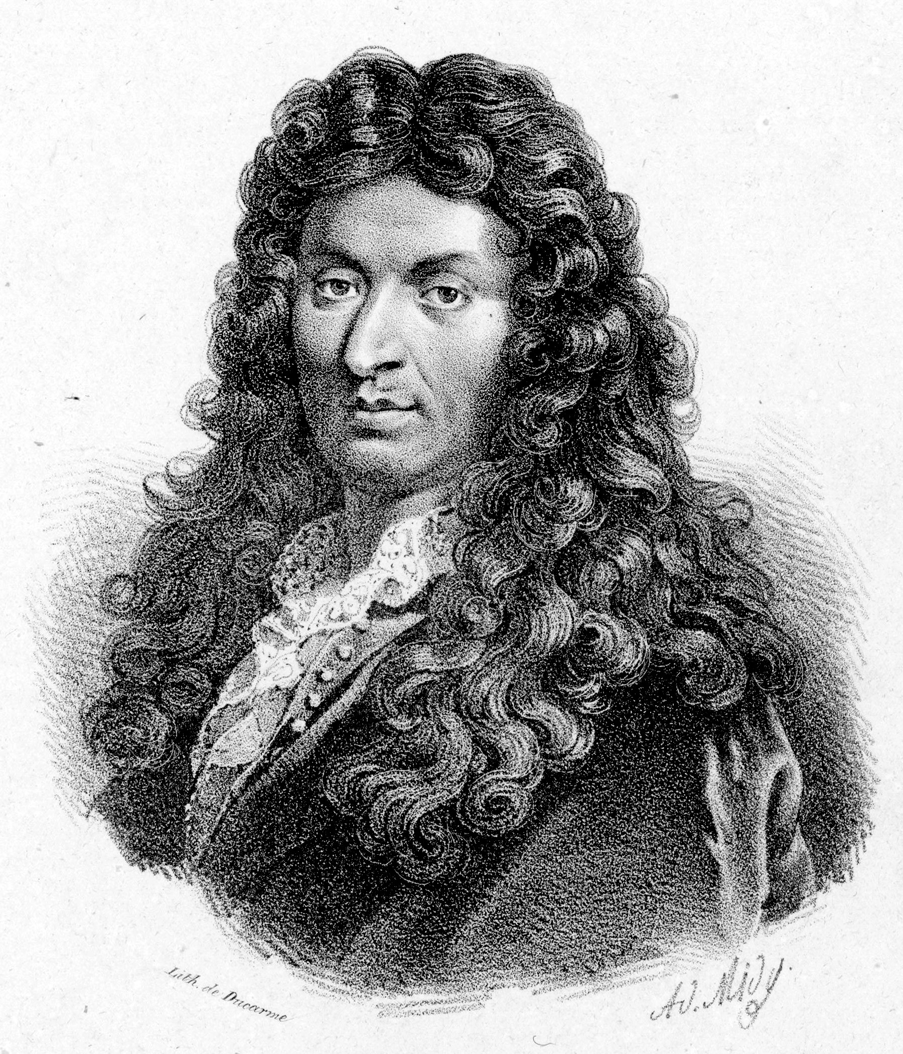 Jean-Baptiste Lully, Lithogr. de Ducarme ; d'après Ad. Midy